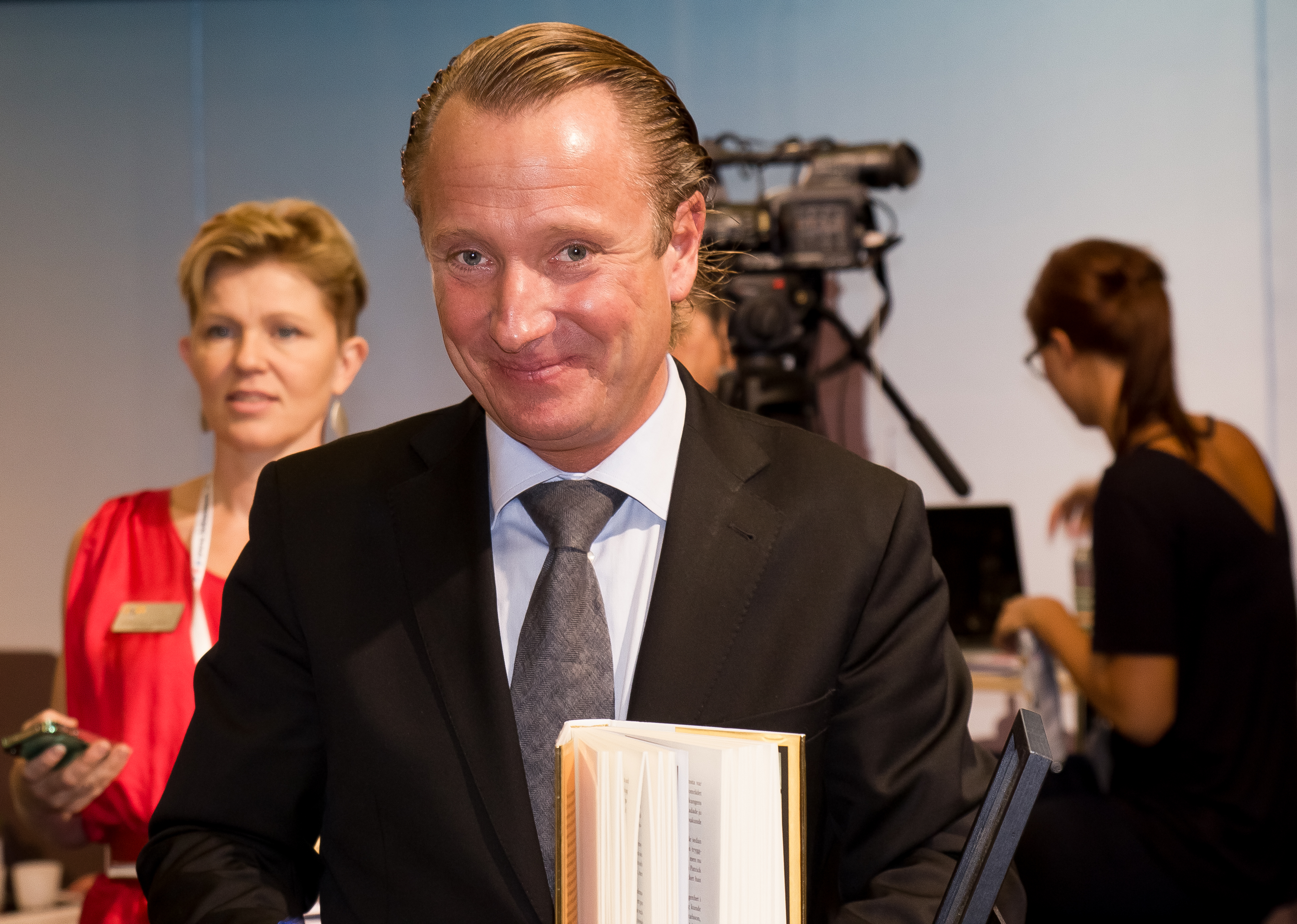 Bokmässan Göteborg 2012